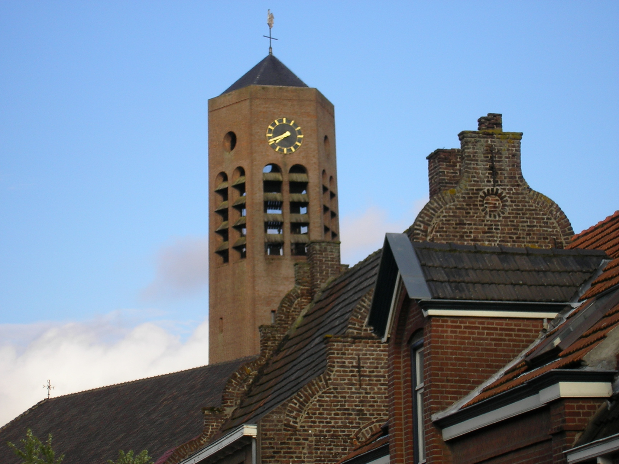 Laurentiuskerke en voormalige synagoge van Vierlingsbeek